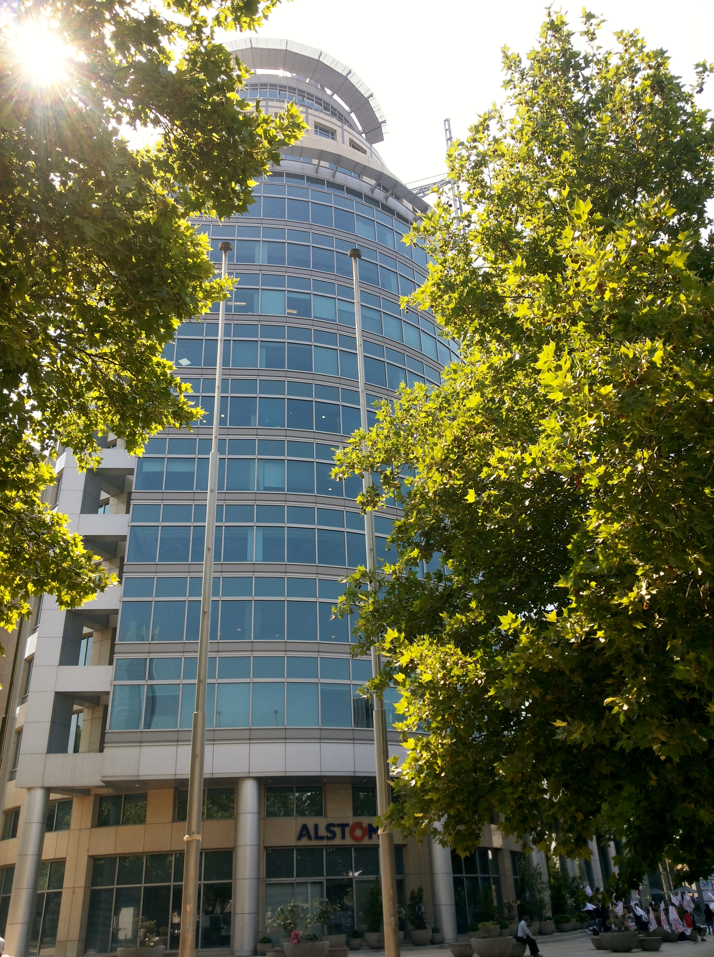 Edificio Birmann 24, ubicado en la calle Mariano Sánchez Fontecilla, esquina Callao, en la comuna de Las Condes. El diseño estuvo a cargo de la oficina de arquitectos Alemparte, Barreda y Asociados; tiene 16 pisos y 5 niveles de subterráneos para 550 estacionamientos. En este edificio tienen sus oficinas centrales una serie de empresas e instituciones, entre ellas la Universidad Andrés Bello.